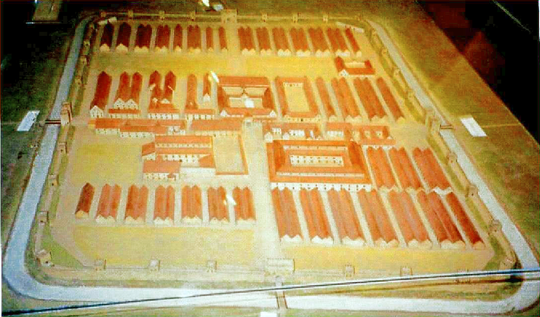 Modell des LL Lauriacum im 3. Jhdt.n.Chr. (RM Enns), Draufsicht